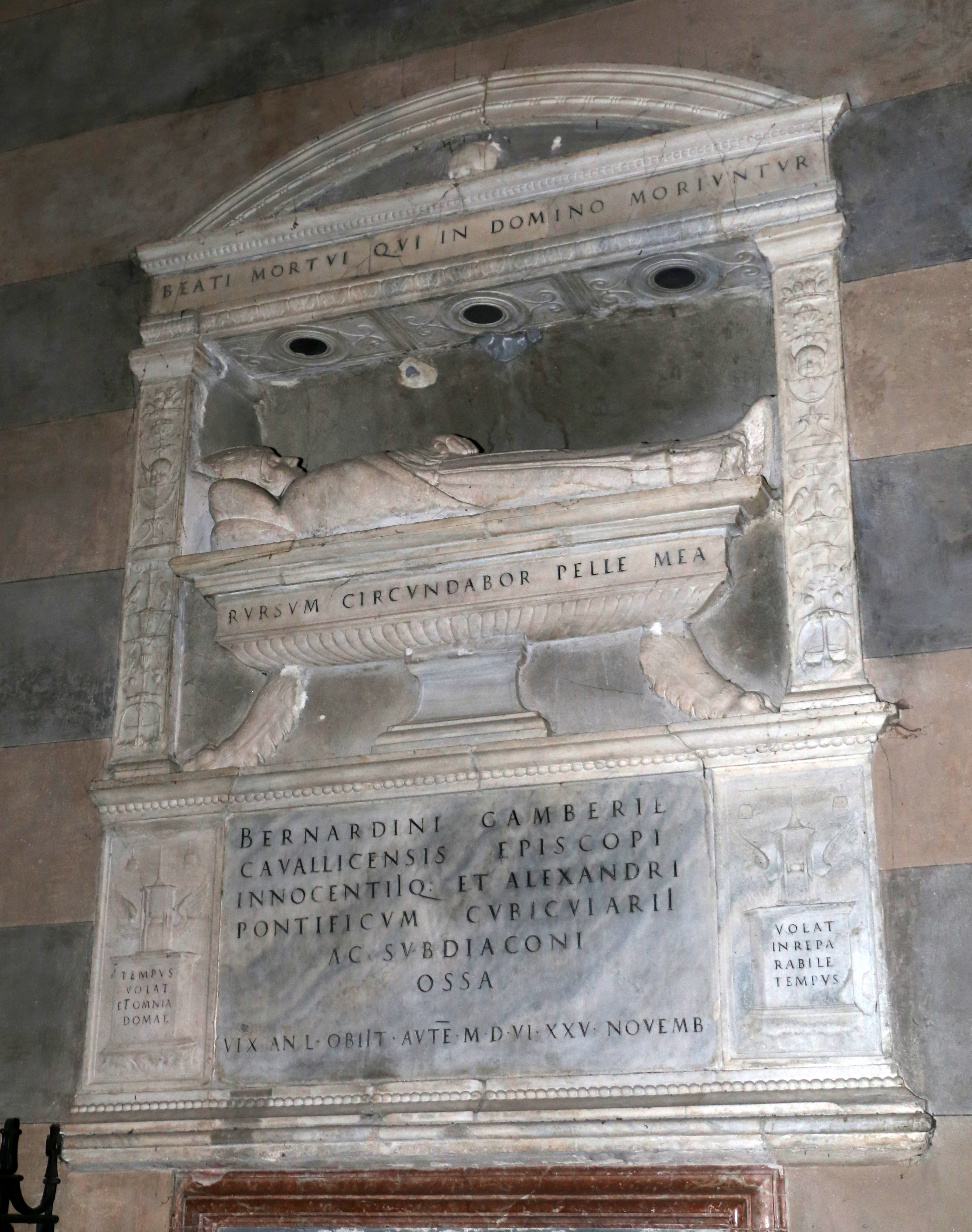 duomo di Sant'Evasio This is a photo of a monument which is part of cultural heritage of Italy.